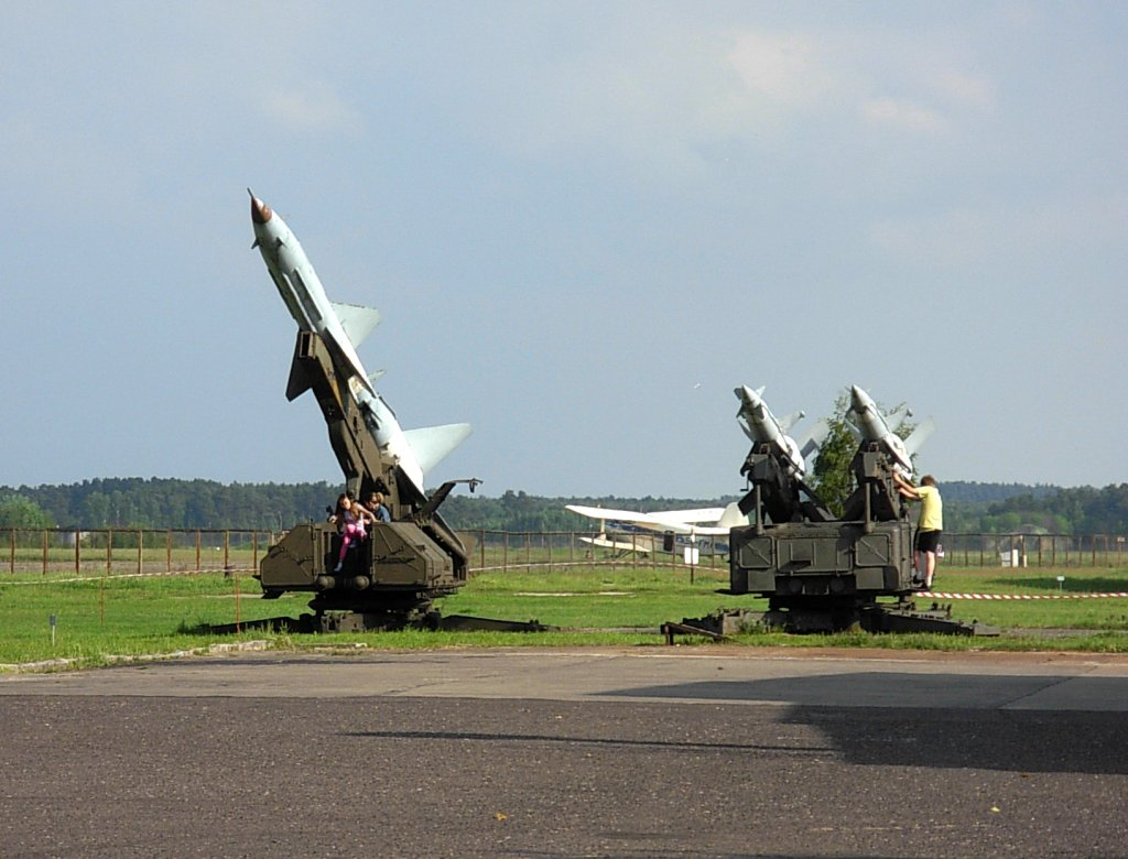 Wojskowe Zakłady Lotnicze nr 2 w Bydgoszczy, wystawa rakiet